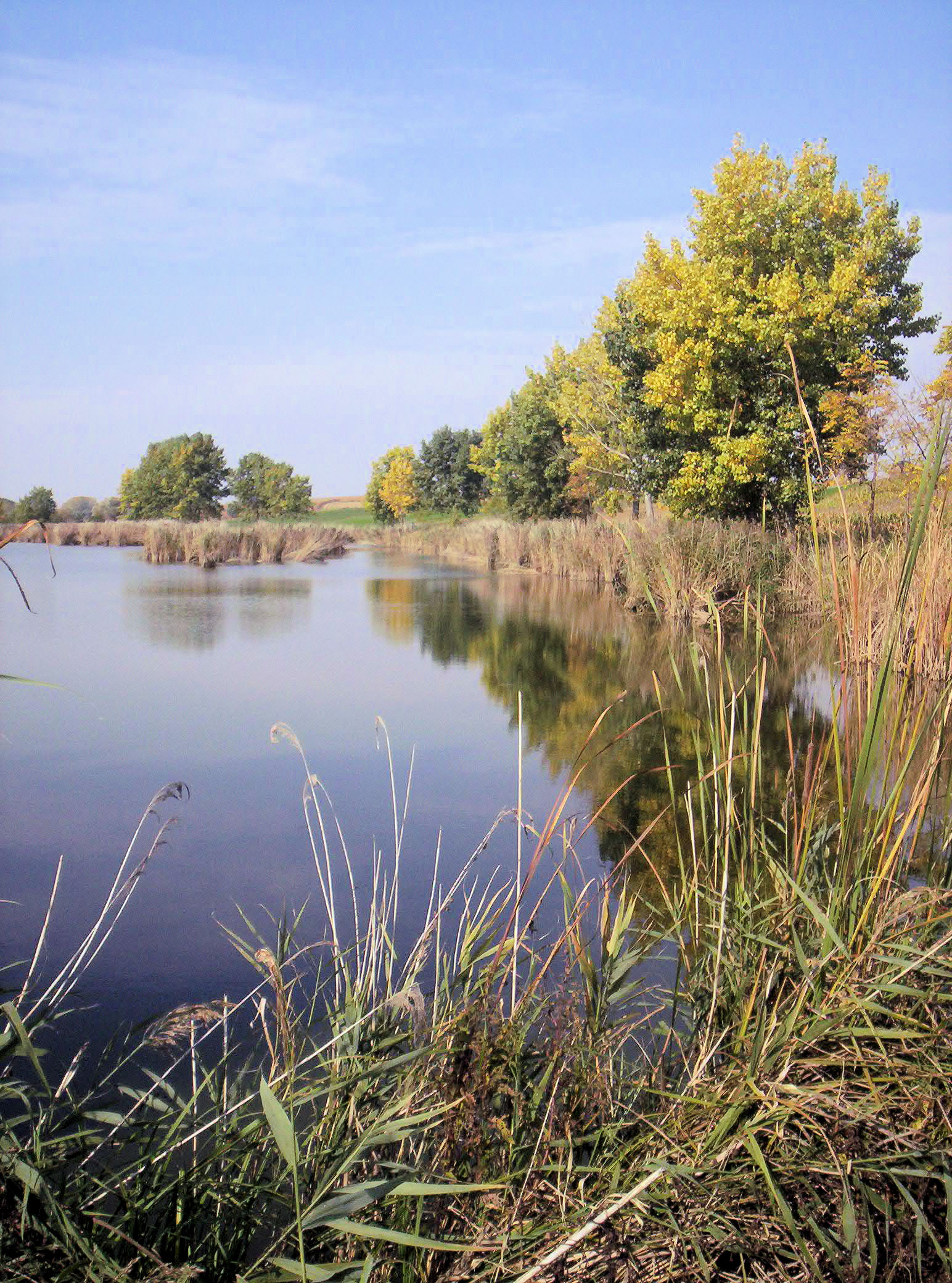 A nagymányoki horgásztó – photo taken by uploader User:Csanády in 2006.